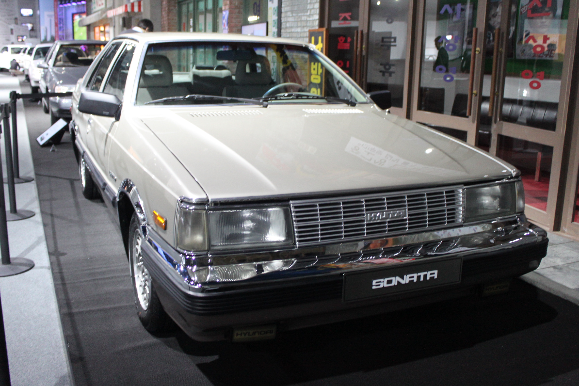 1987년에 생산된 소나타 1세대